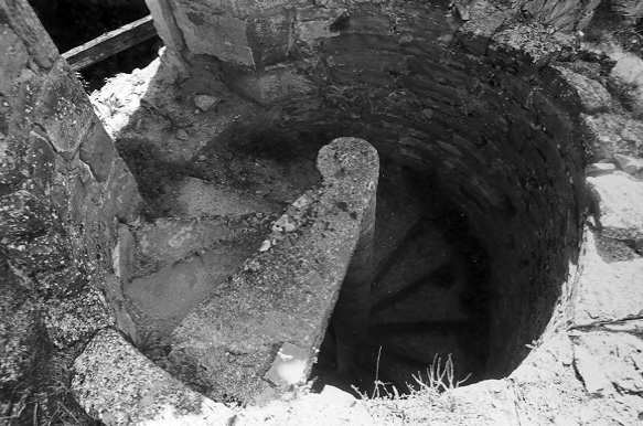 Escalera circular en ruinas en el palacio de Formigales antes de la restauración